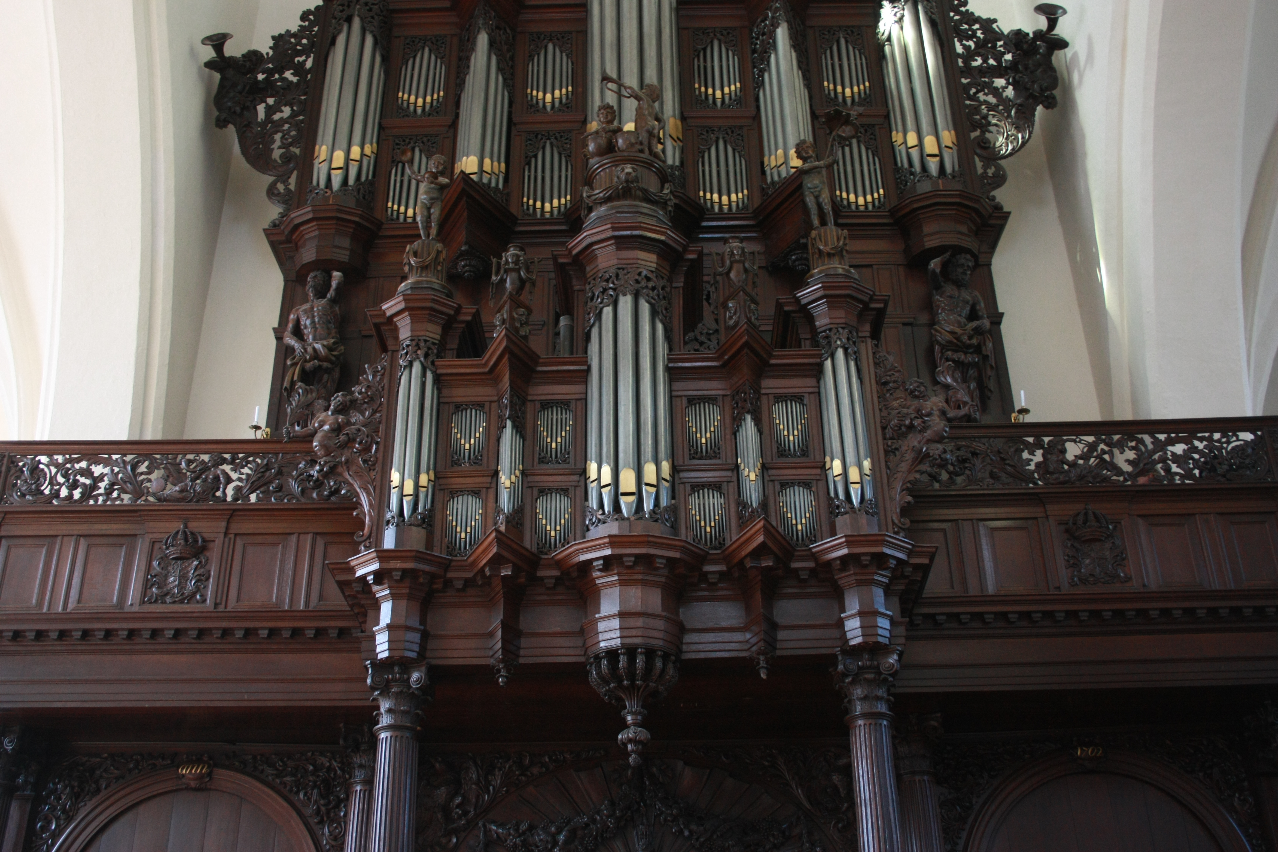 Orgel in Groningen, Der Aa-kerk, Niederlande